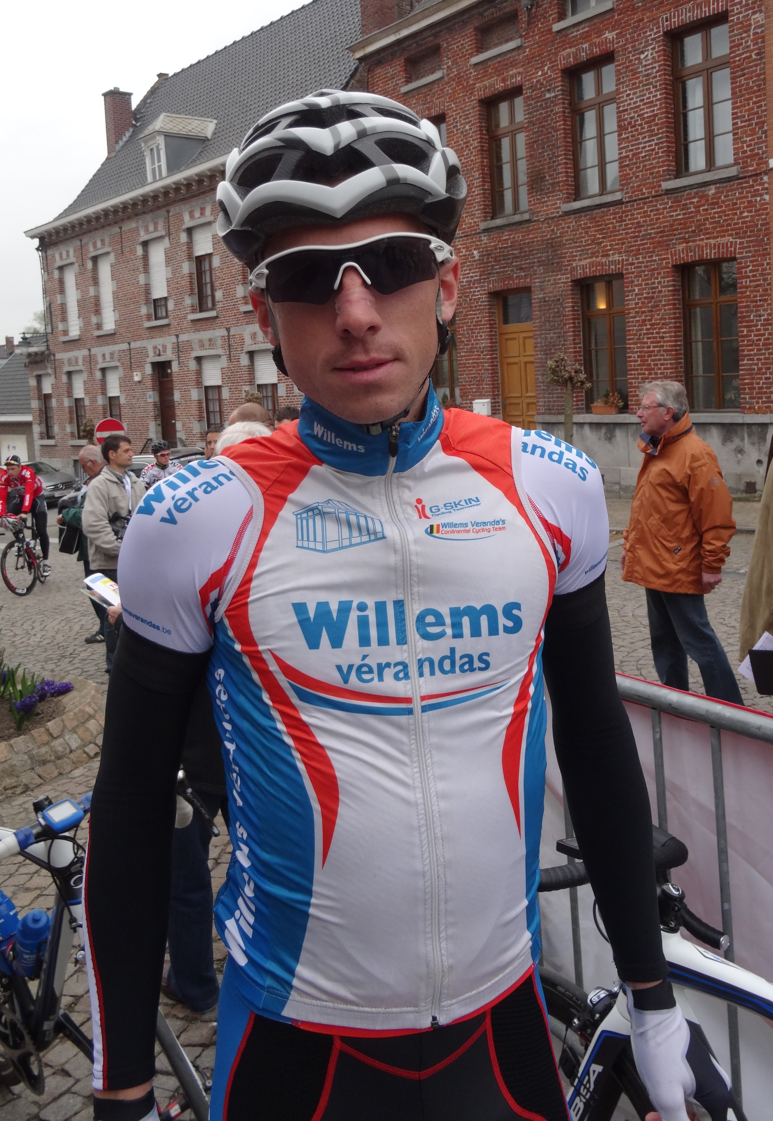 Triptyque des Monts et Châteaux 2014, étape 1, 4 avril 2014, départ d'Antoing. The creation of these files was made possible thanks to the organizers of the Triptyque des Monts et Châteaux 2014 English | français | +/− Depicted team: Verandas Willems The creation of these files was made possible thanks to the organizers of the Triptyque des Monts et Châteaux 2014 English | français | +/−